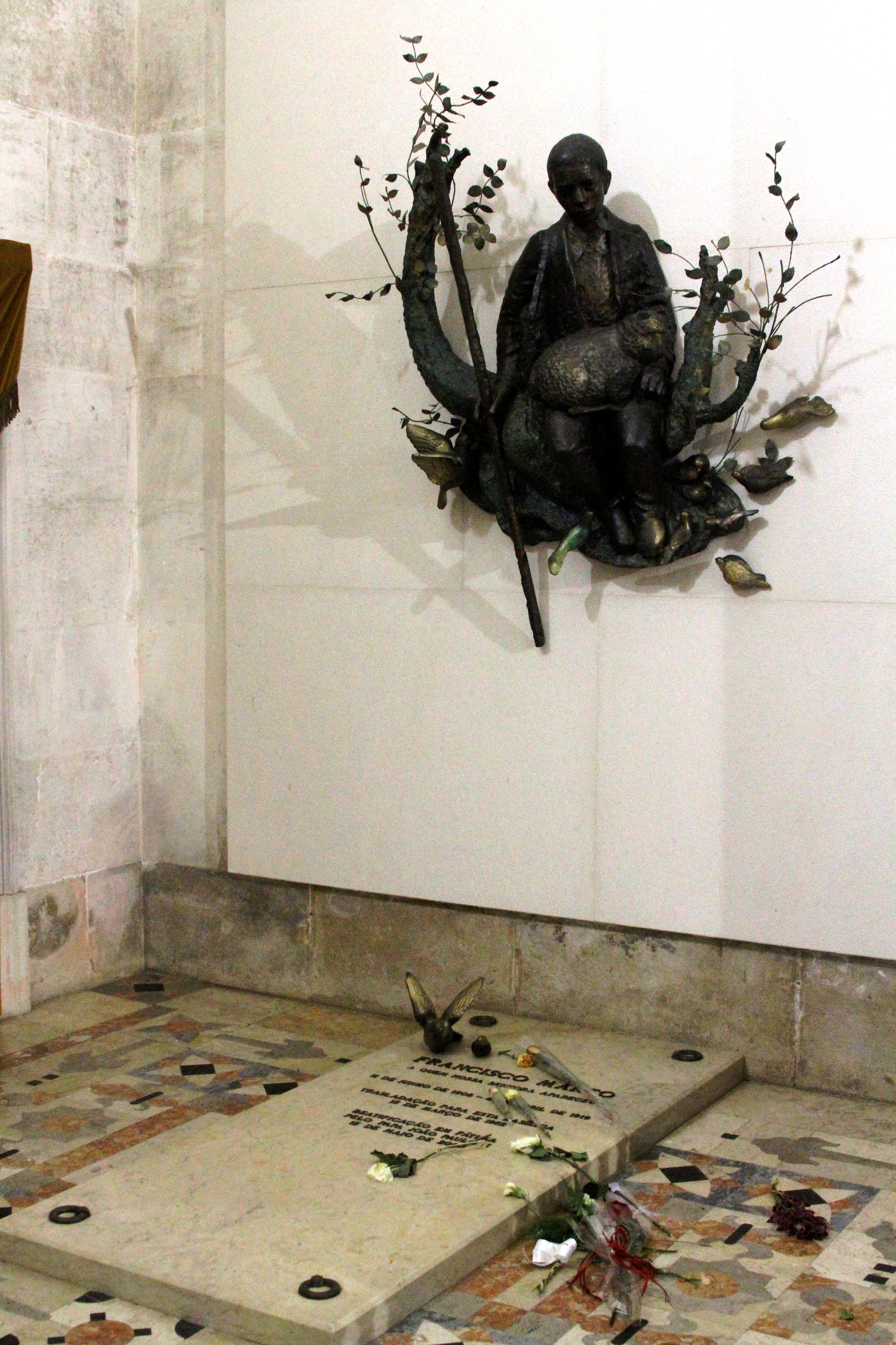 Túmulo